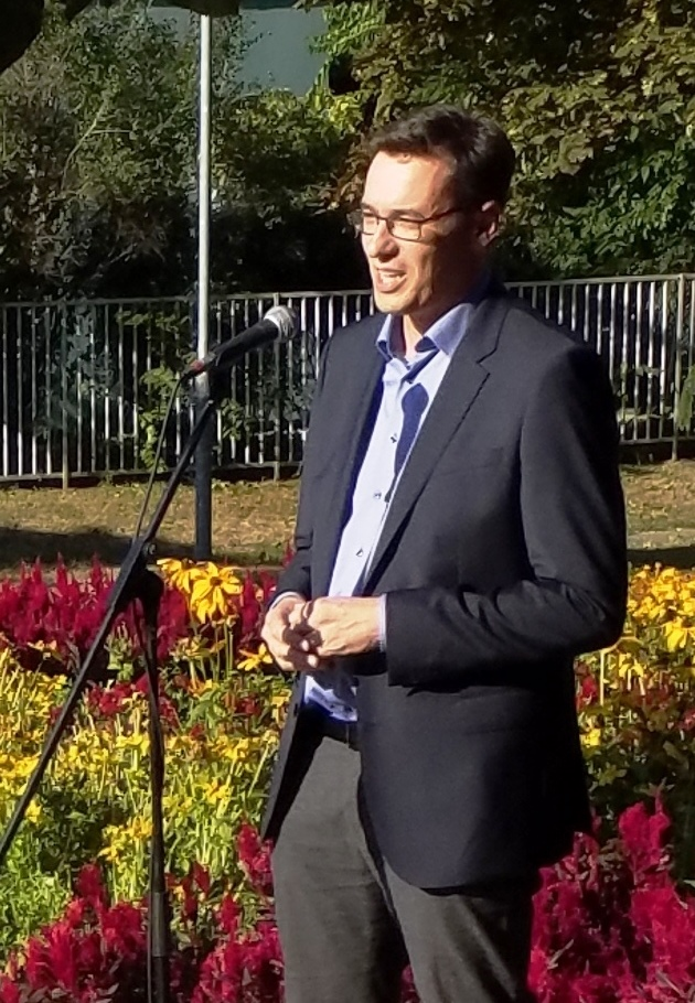 Karácsony Gergely Zsivora György szobrának avatásán (Budapest XIV. Zsivora park)